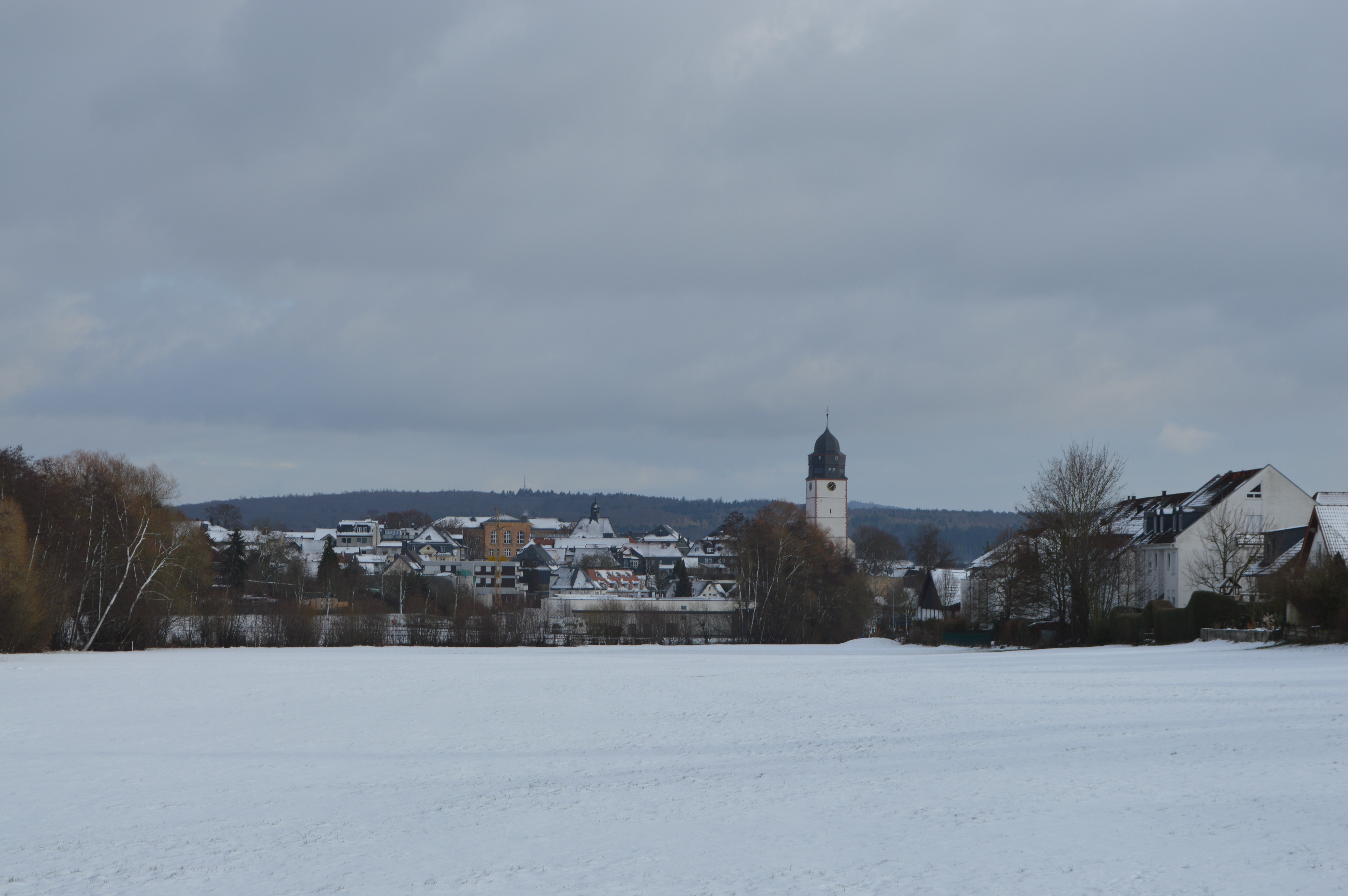 Usingen im Januar 2017